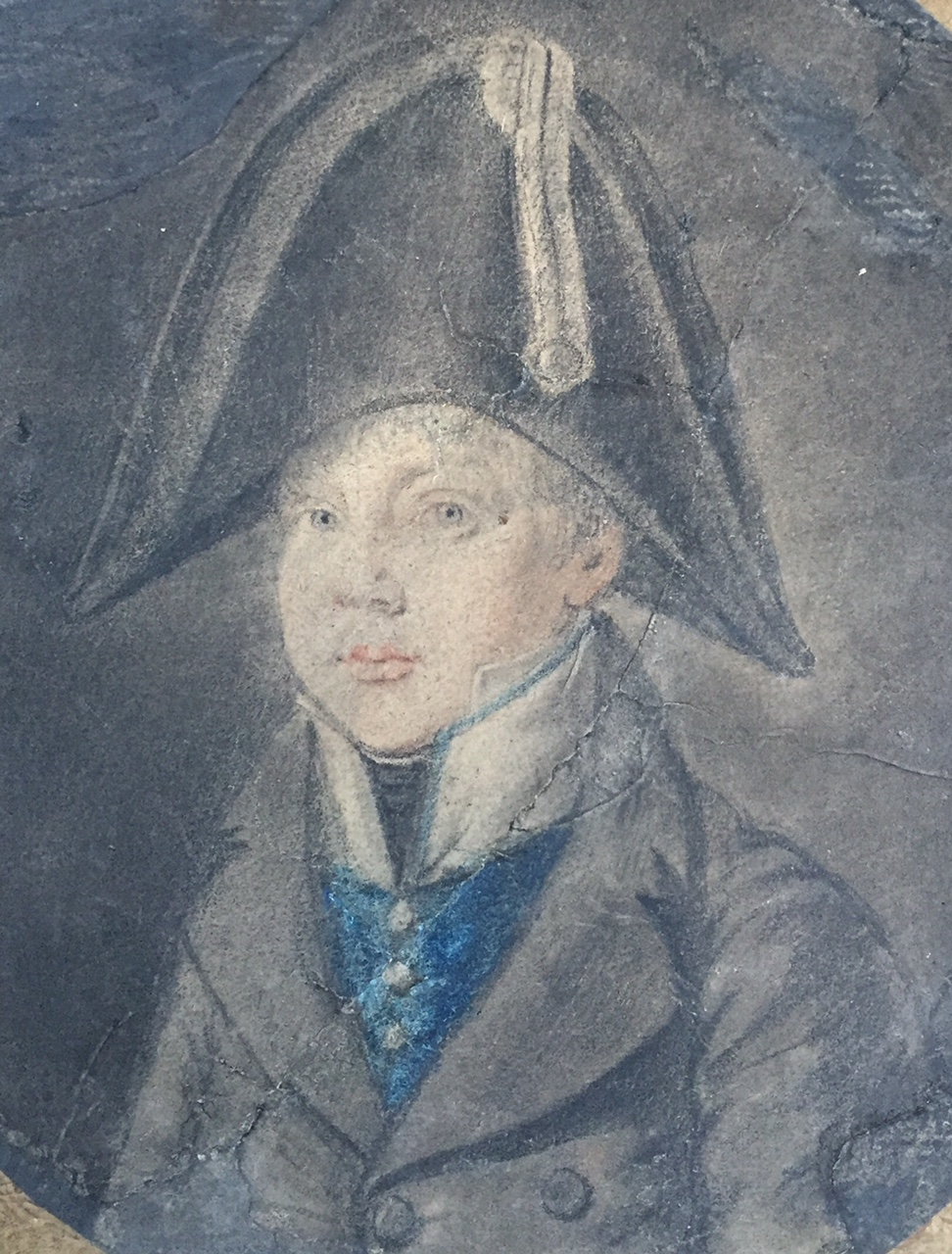 Élève de l'école de marine de Brest dessiné par Jean-Baptiste Isabey (1767-1855)